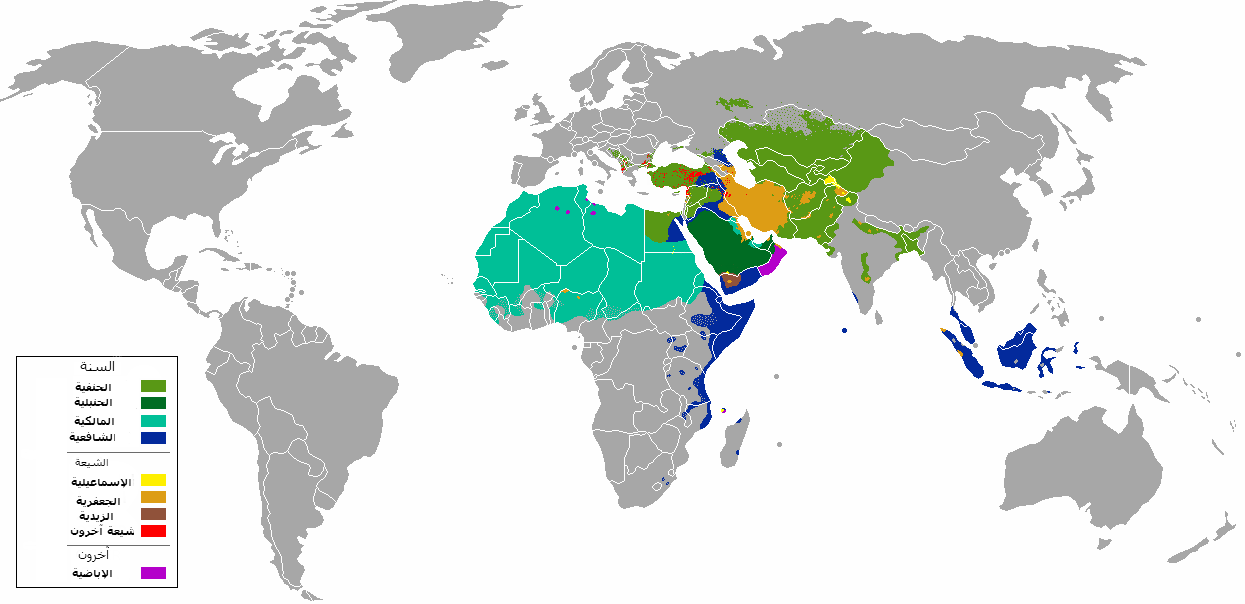 خريطة إنتشار المذاهب الإسلامية